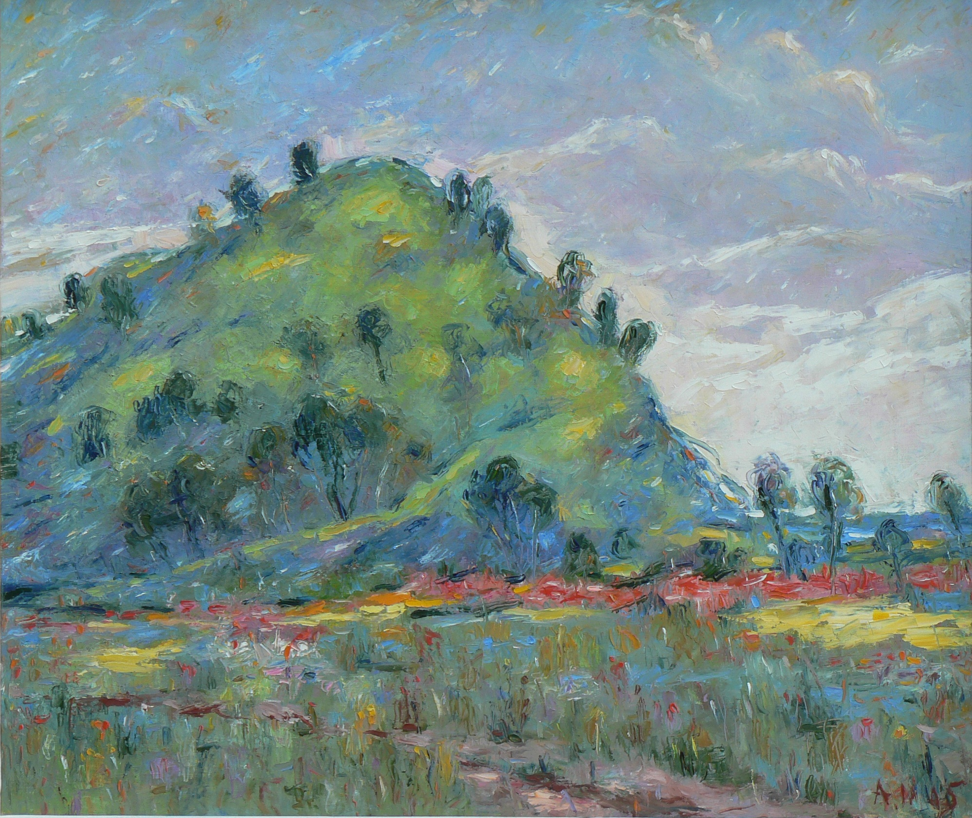 «Мізоцький кряж» (2005). Автор Мартиненко Анатолій Іванович